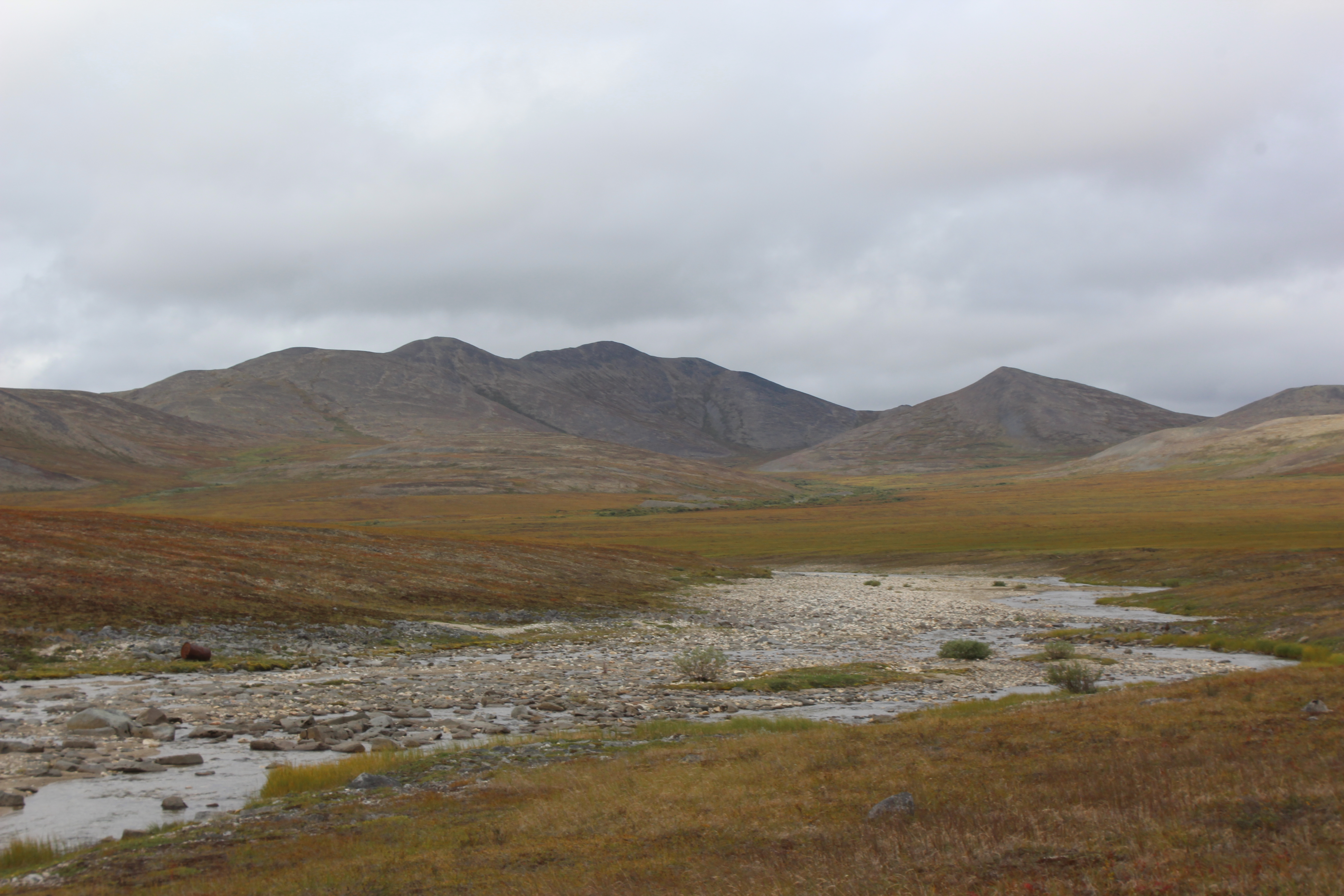 Сборный ручей, Золотой хребет.